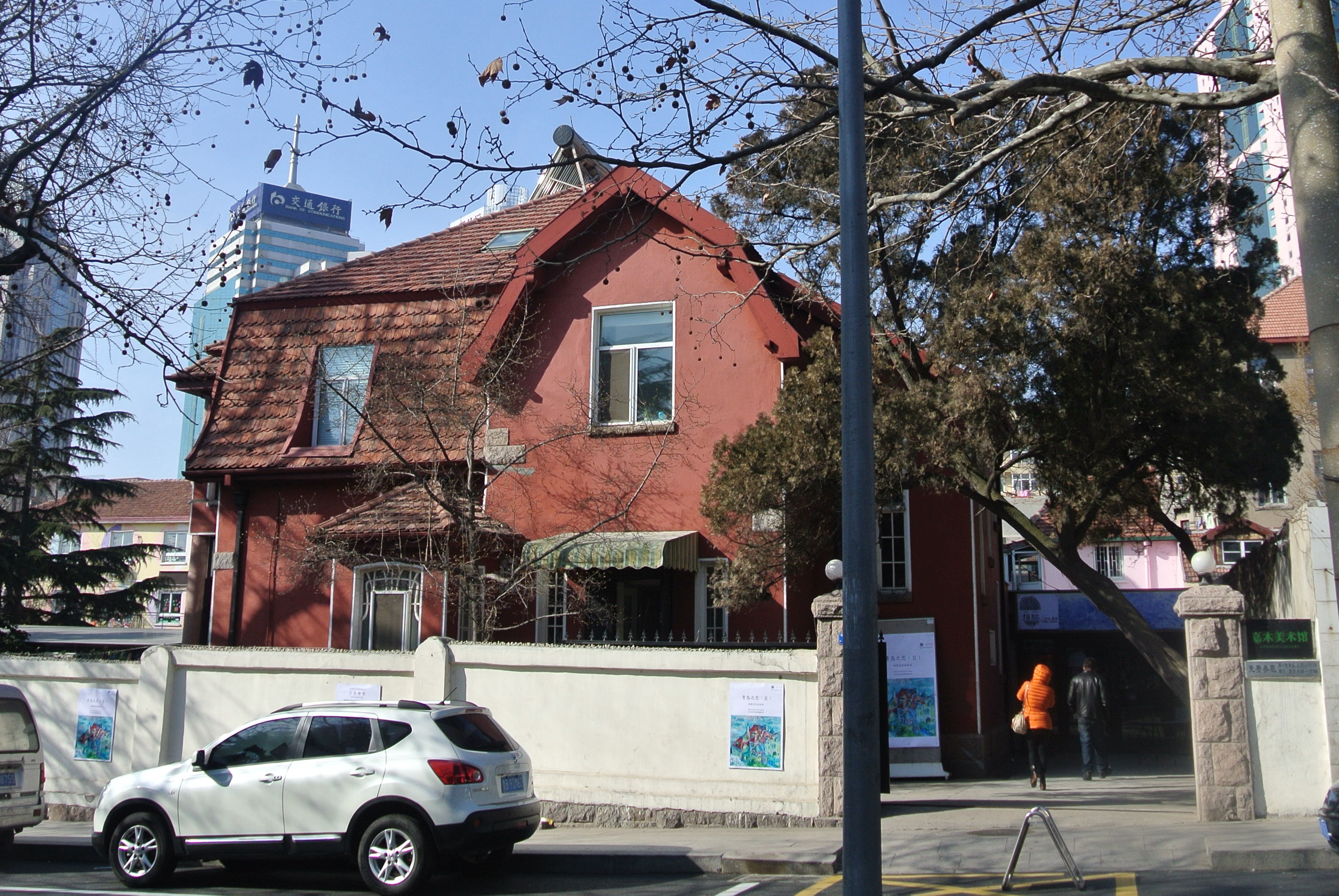 青岛安徽路16号